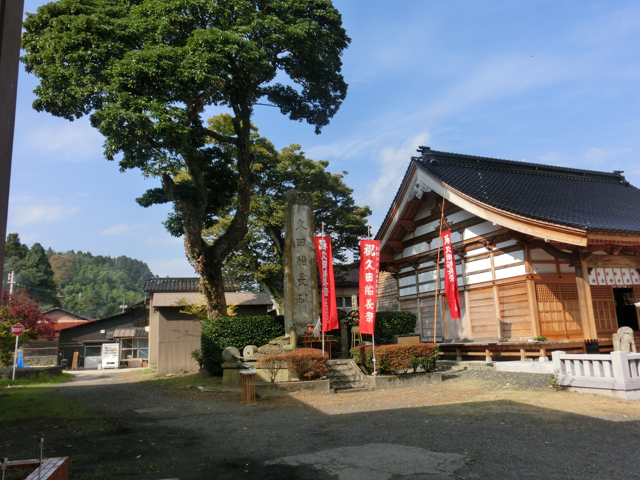 久田船長の故郷 能登町鵜川にある「久田船長碑」。 鵜川の中心である菅原神社境内に 高さ6.6m、幅1.2mの石碑が建っている。題字の「久田船長碑」は当時の内閣総理大臣 斎藤実の書である 昭和9年石碑を建立した。